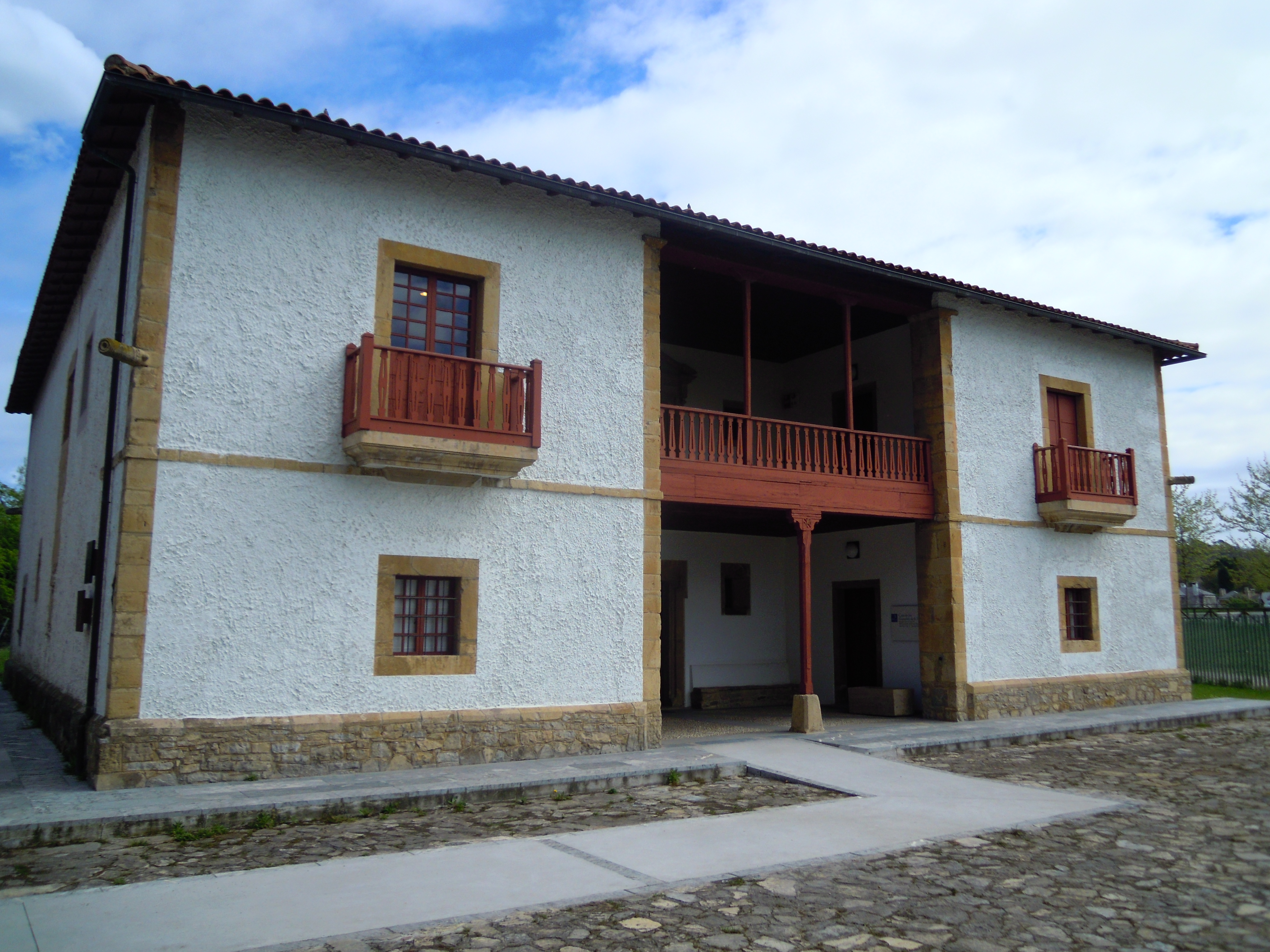 Muséu del Pueblu d'Asturies